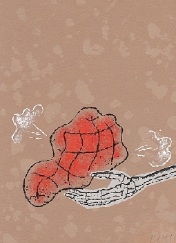 Pneu